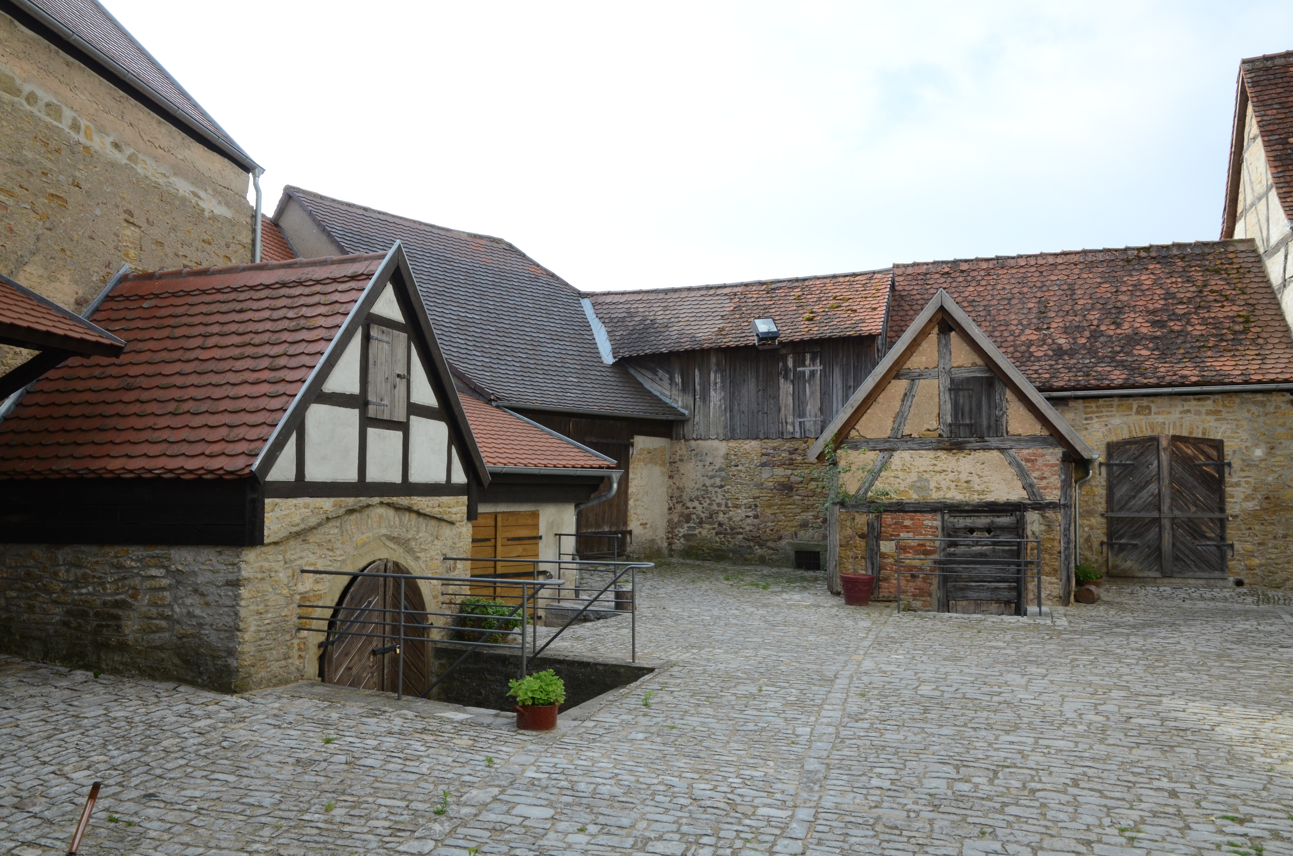 Kleinlangheim evangelische Kirche St. Georg und Maria, Gaden